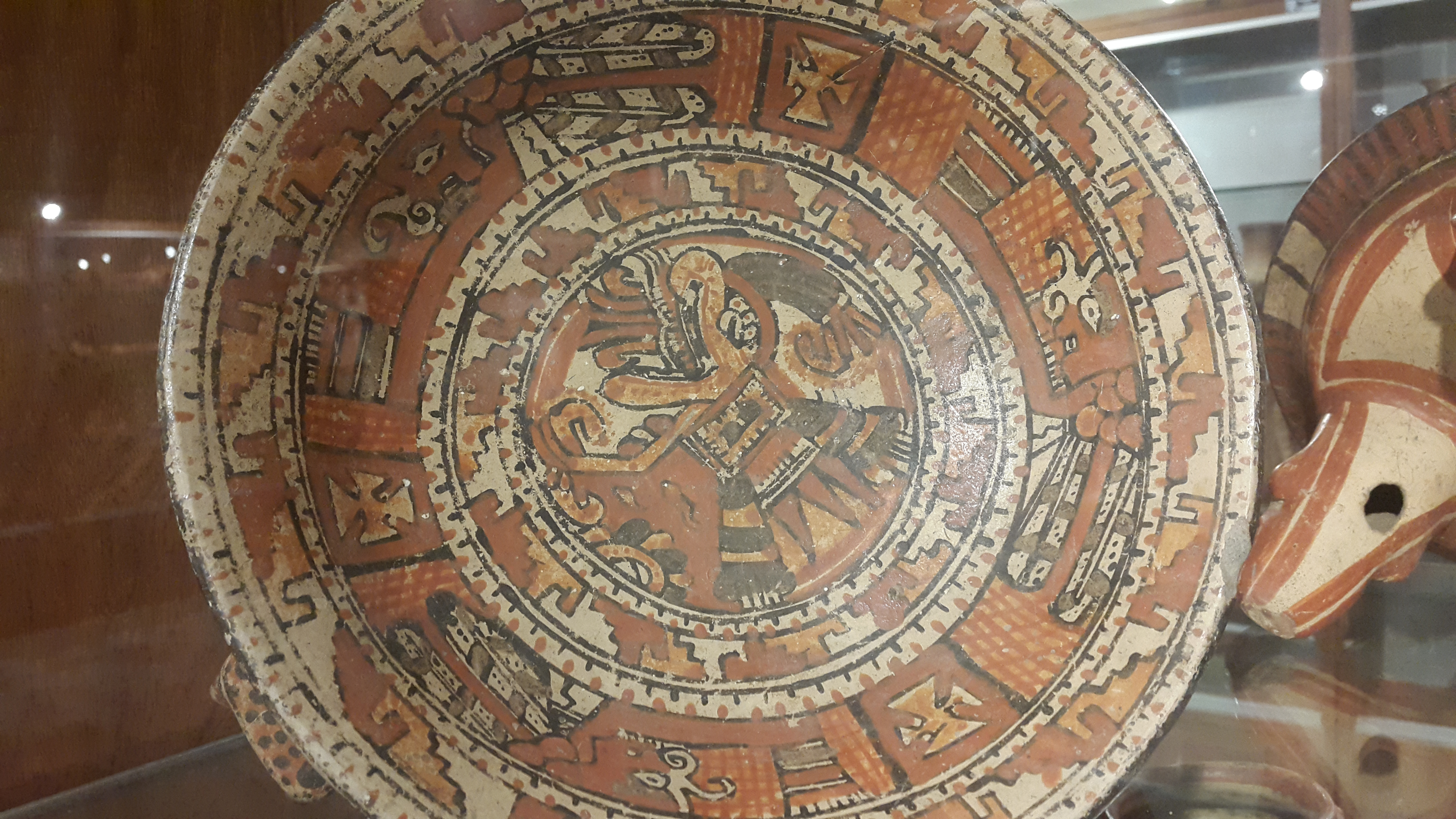 Plato de cerámica precolombina, con diseño de estilo mesoamericano. Museo del Jade. Costa Rica.